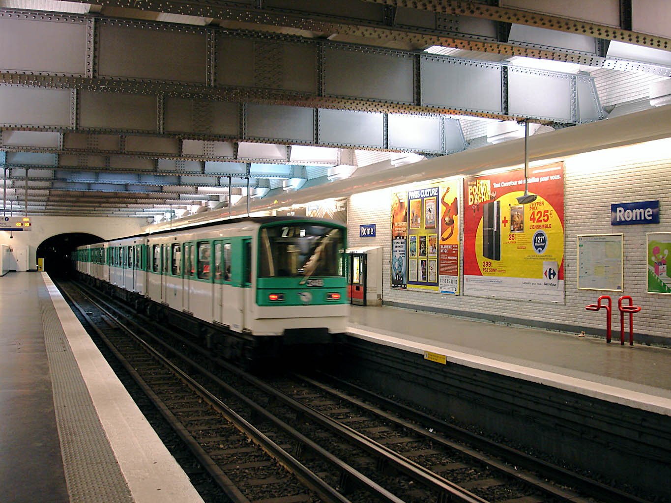 Station Rome de la ligne 2 du métro de Paris, France.